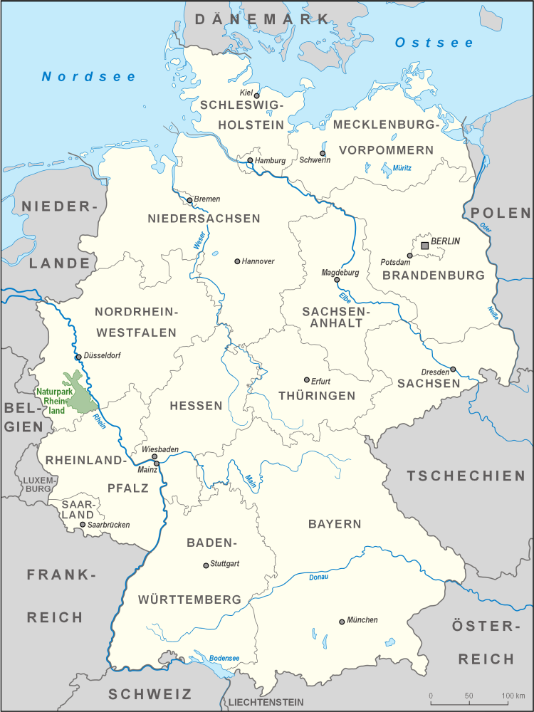 Karte des Naturparks Rheinland in Deutschland